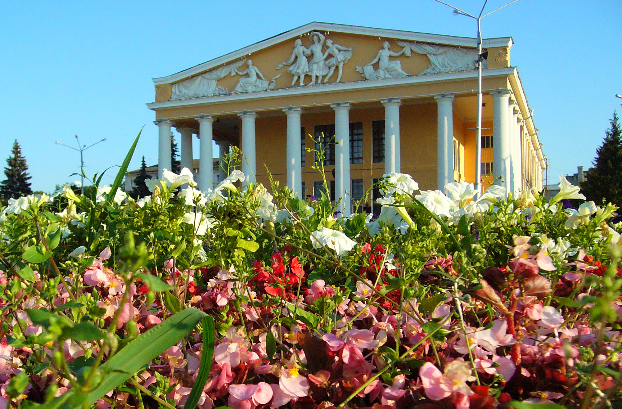 Чувашский государственный академический драматический театр имени К. В. Иванова. Июнь 2008